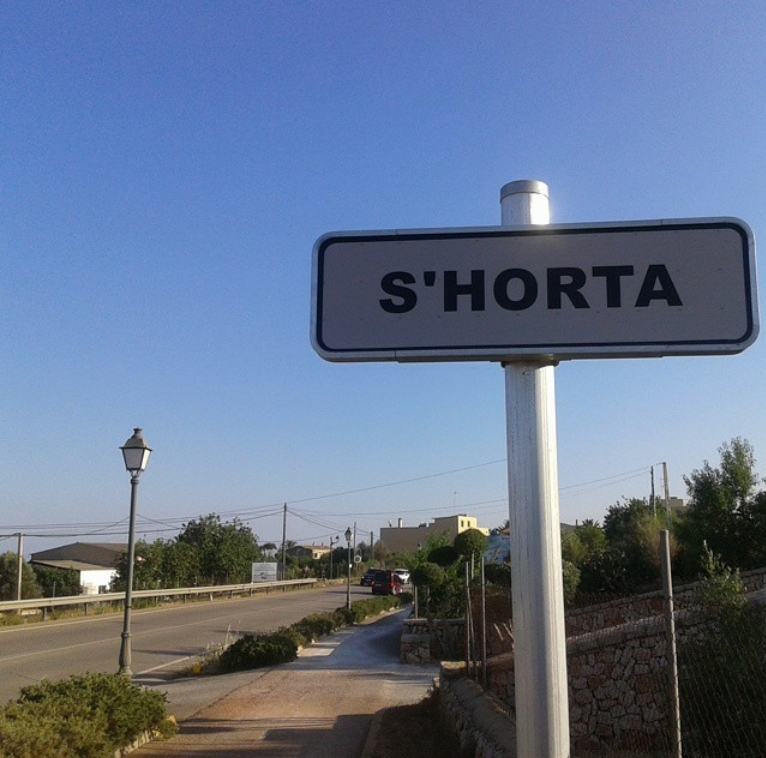 Entrada de la localidad de s'Horta, en el municipio de Felanich (Baleares, España)